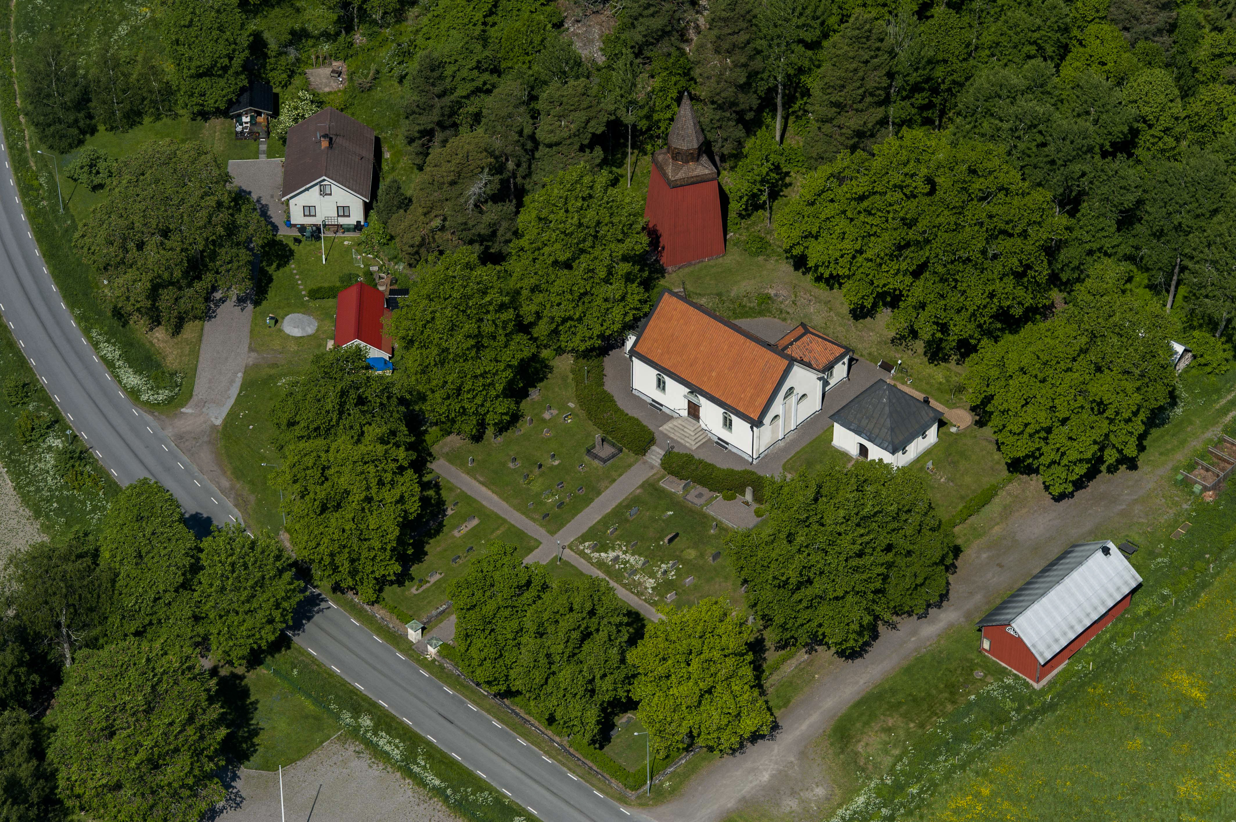 Börrums ka